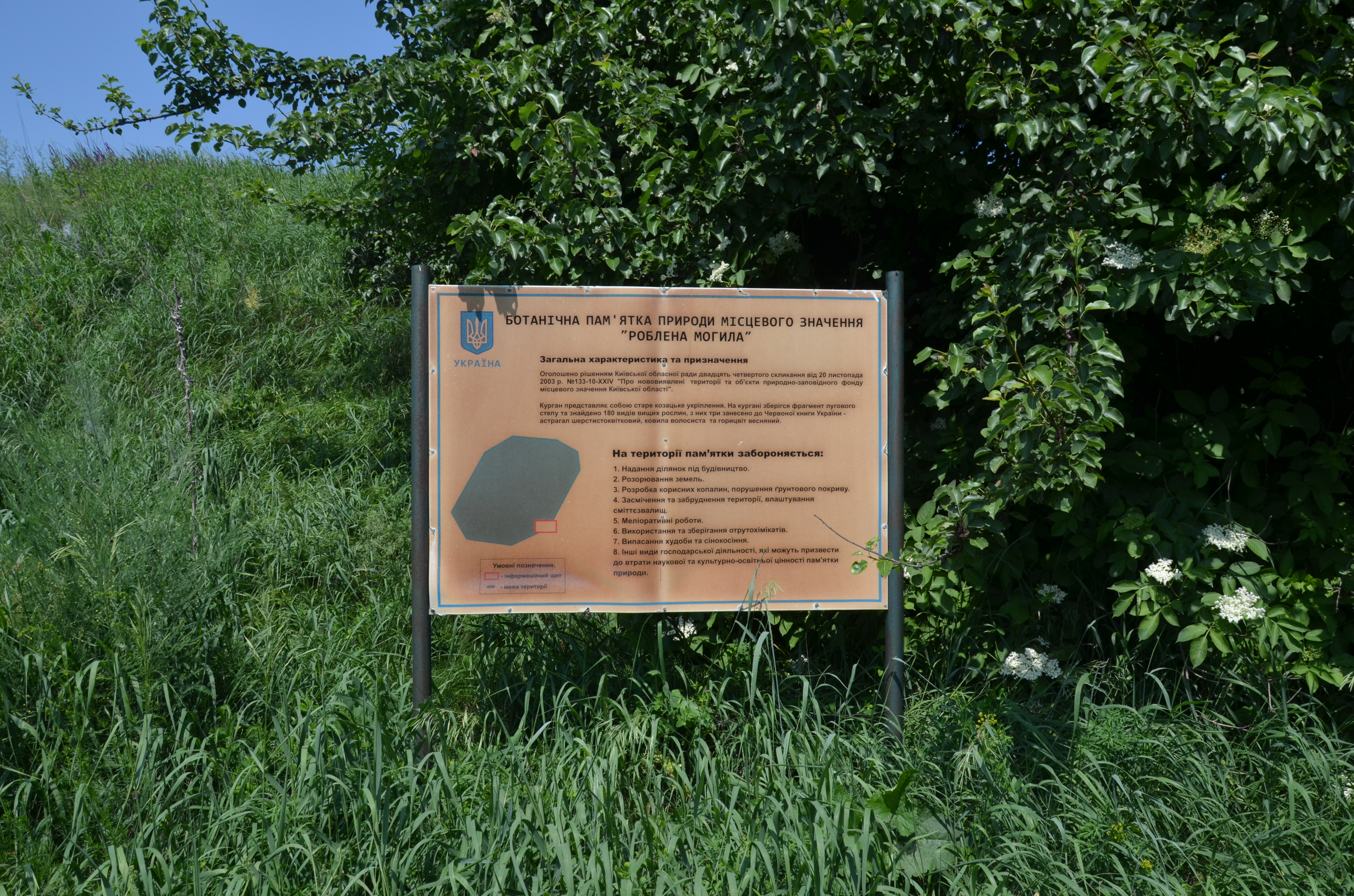 Роблена могила, Переяслав-Хмельницький район, Козлівська сільська рада